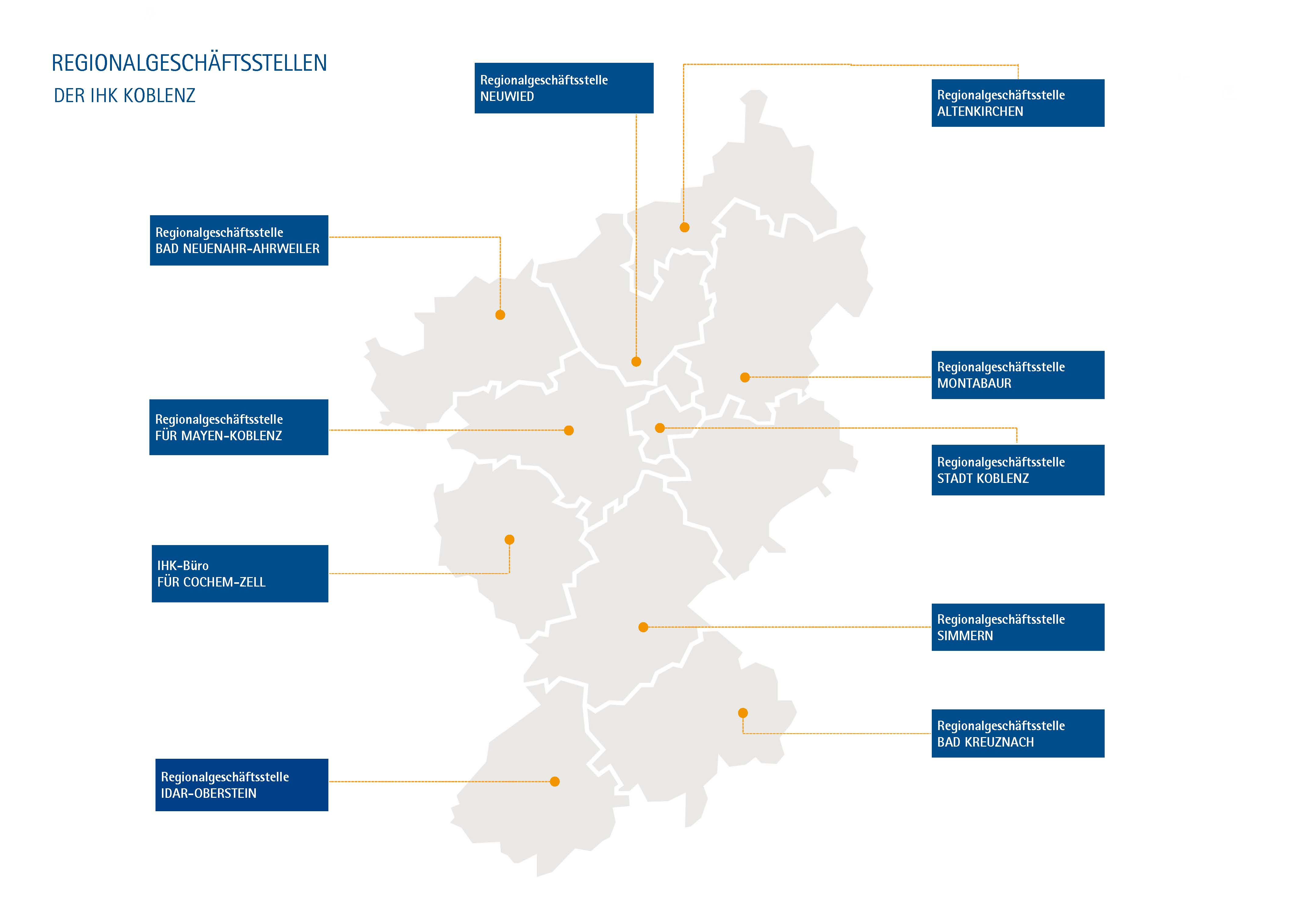 Die Regionalgeschäftsstellen der IHK Koblenz